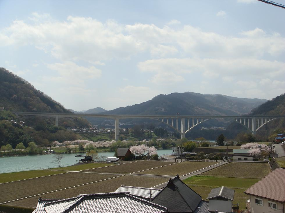 徳島自動車道 池田へそっ湖大橋（徳島県三好市池田町）